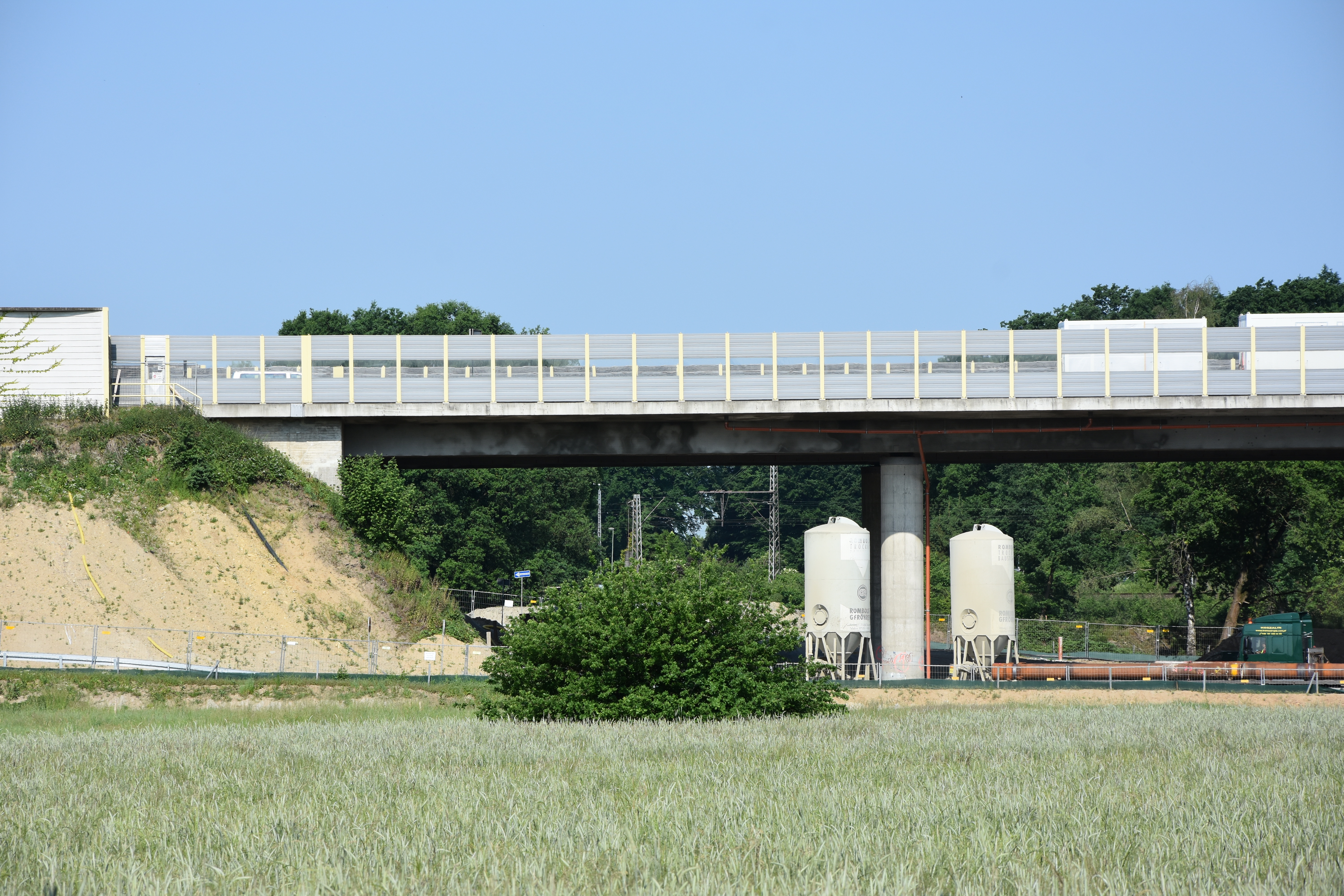 Dütebrücke bei Osnabrück